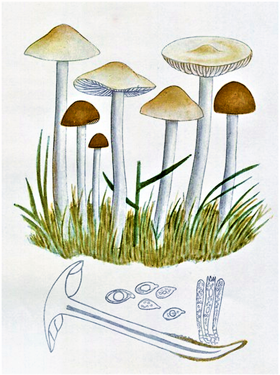 Giacomo Bresadola: Marasmius oreades (Bolton, 1791) Fr. (1836)